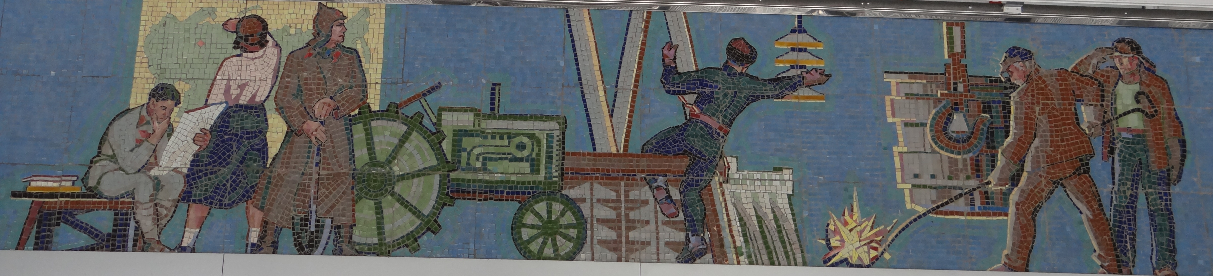 Маріуполь. Аеропорт, мозаїка